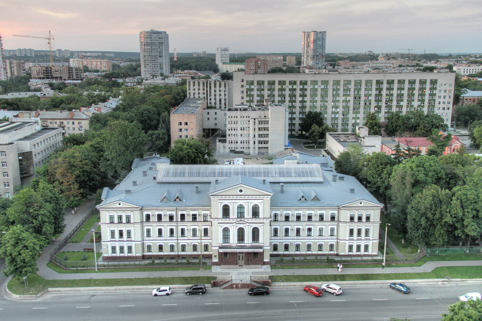 Клініка факультету медичного університету, Харків, просп. Правди, 13